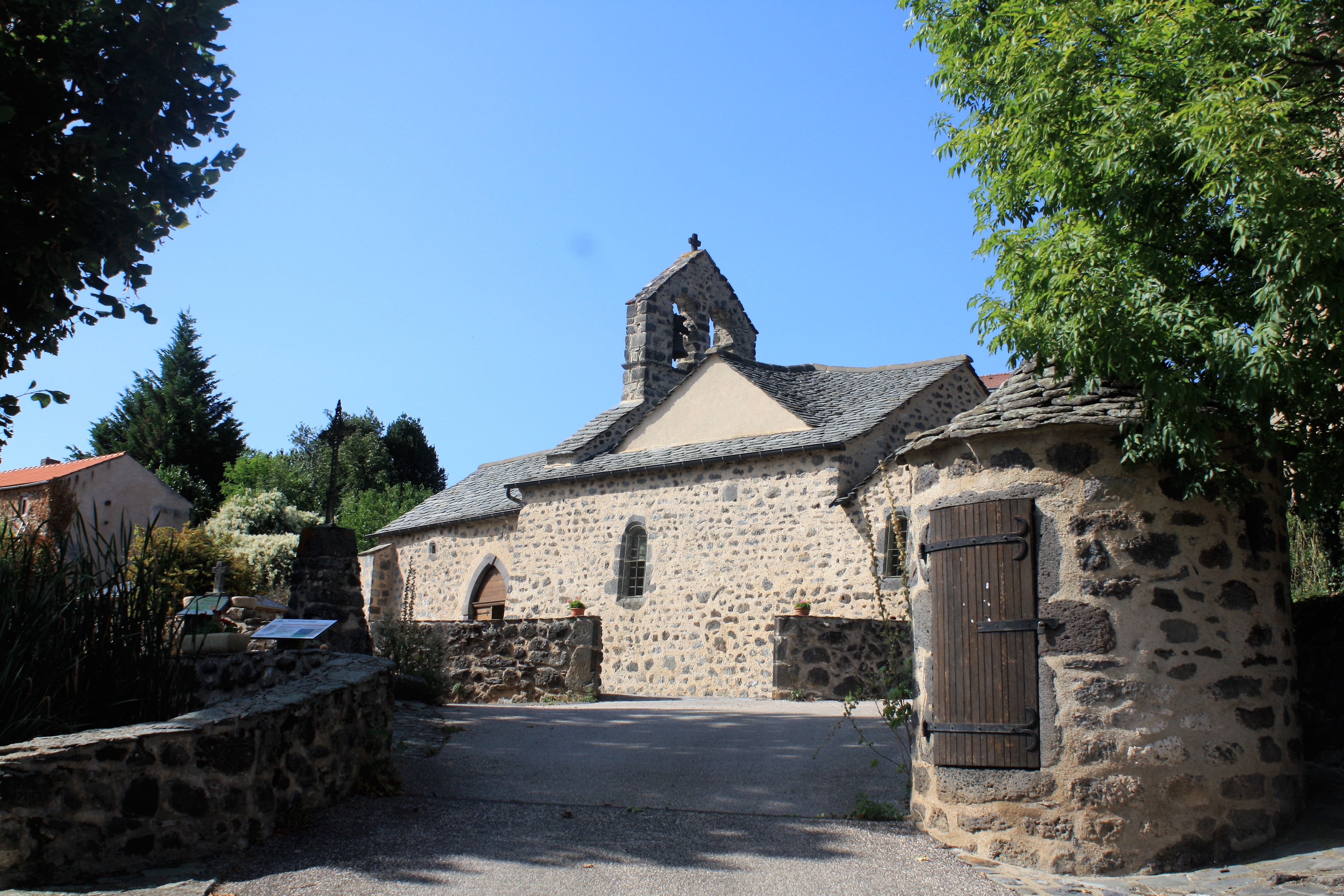 Église Sainte-Marguerite de Ternant-les-Eaux .